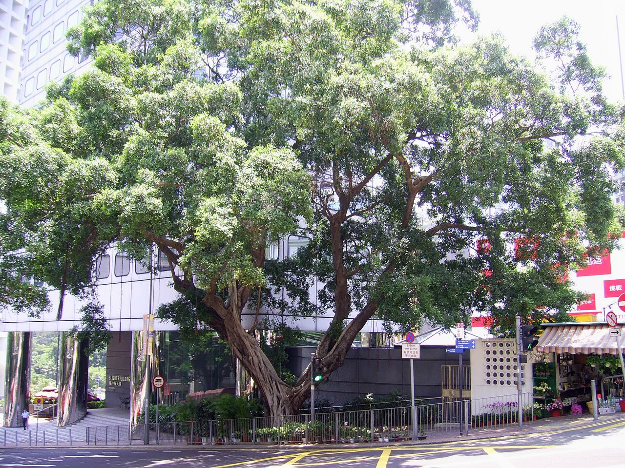 細葉榕